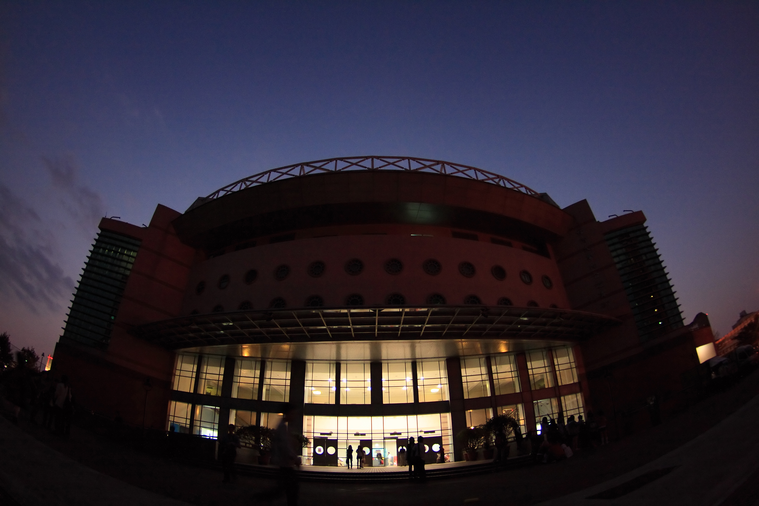 中文（台灣）: 國立臺灣大學綜合體育館正面夜景全景照片。